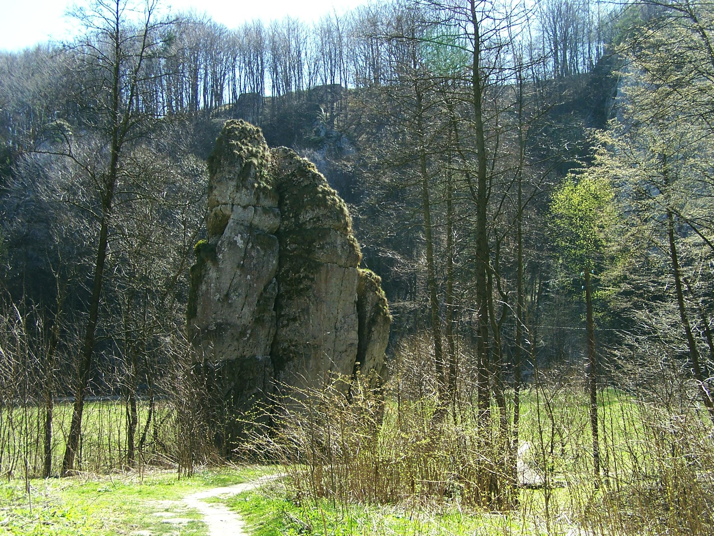 Dolina Będkowska (Park Krajobrazowy Dolinki Krakowskie)